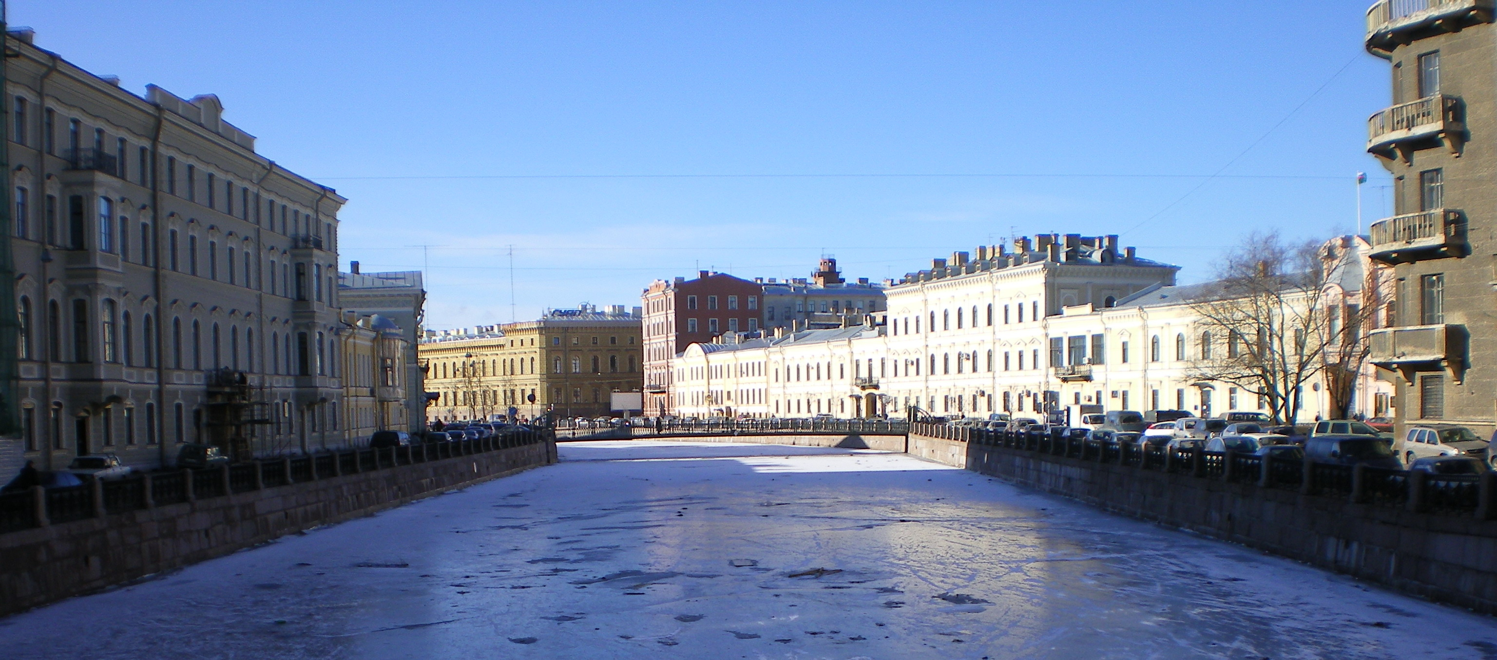 Почтамтский мост в Санкт-Петербурге. Вид на фоне городской застройки